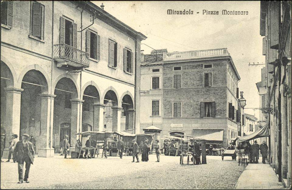 Piazza Montanara (attuale piazza Mazzini) a Mirandola nel primo dopoguerra